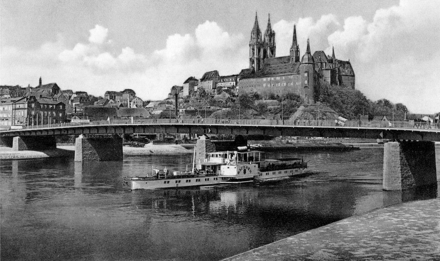 Meißen; Albrechtsburg und Dom - Elbe mit Dampfer Sachsen This postcard is from publisher Brück & Sohn in Meißen ( postcard has a unique number 26465 and is available in a higher resolution at the publisher. This images was uploaded in a cooperation project between Wikipedians and the publisher.